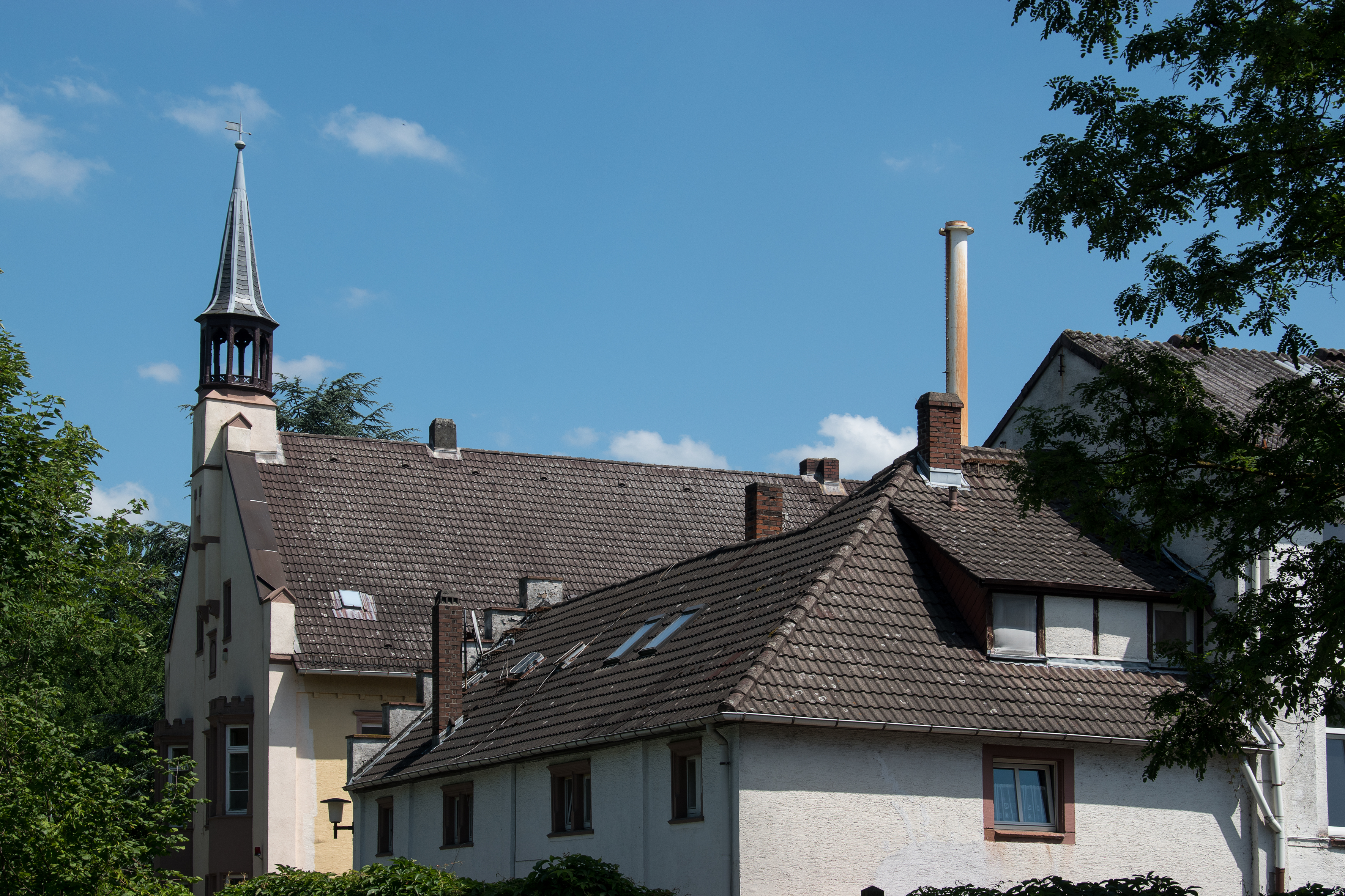 Denkmalgeschütztes Gebäude in Mühltal, Ortsteil Nieder-Ramstadt, Rheinstraße 38